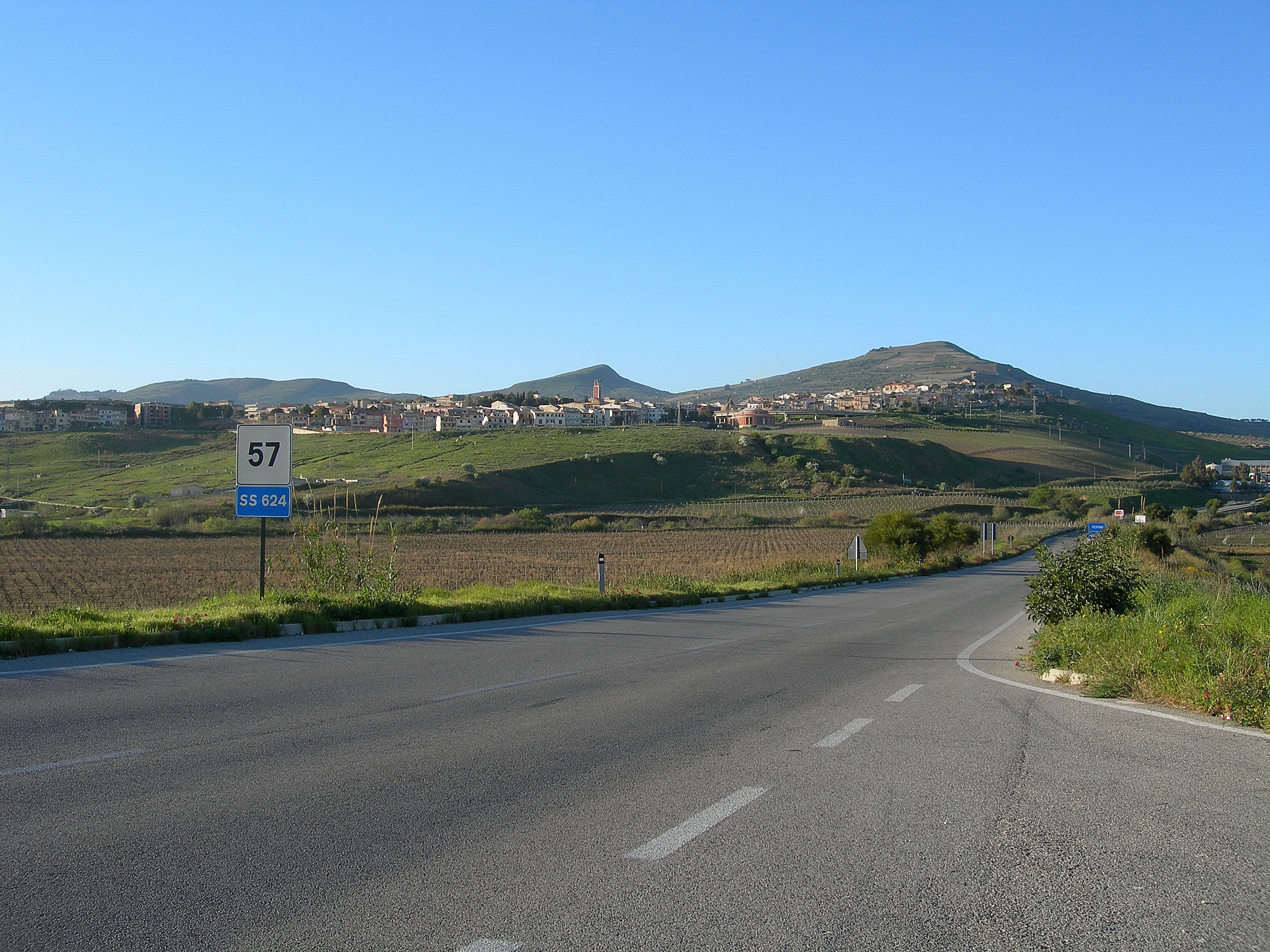 La strada statale 624 al chilometro 57. Sullo sfondo il centro abitato di Poggioreale.